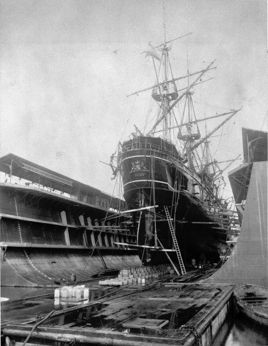 Foto. Droogdok met het schroefstoomschip "Atjeh" van de Koninklijke Marine, Soerabaja